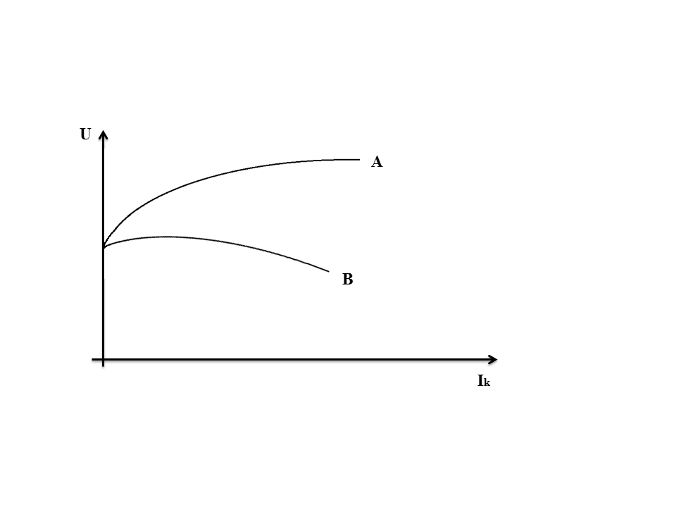 Vegyes gerjesztésű generátor terhelési karakterisztikája